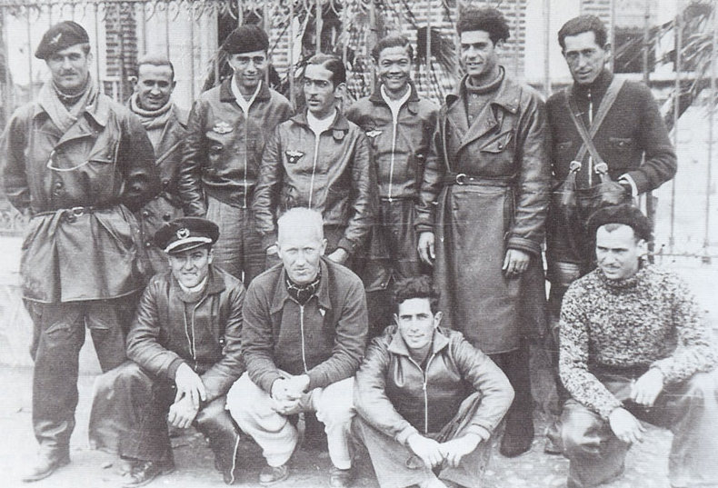 Fotografía de la Escuadrilla Lacalle tomada en febrero-marzo de 1937, con unos cuantos conocidos: comenzamos con el propio Lacalle (segundo de pie por la derecha), uno de los mejores pilotos españoles del conflicto. A su derecha, un sonriente Castañeda. En el extremo izquierdo, con boina y bigote, el estadounidense Frank Glasgow Tinker, que acreditaría 8 derribos en el conflicto (entre ellos, el primer Messersmichtt Bf 109 abatido en la historia). En la fila inferior, en el centro y con pelo blanco, encontramos otro norteamericano, Dahl, que sería derribado y canjeado. A su derecha, sentado, encontramos al uruguayo Luis Tuya, muerto en combate al ser derribado por Salas Larrazabal sobre Teruel en abril de 1937. Justo detrás de Dahl, con un bigotito, “Juan Gómez”: el guatemalteco Miguel García Granados. Teniendo en cuenta que fue derribado en marzo del 37, la fotografía debe ser anterior a esa fecha.